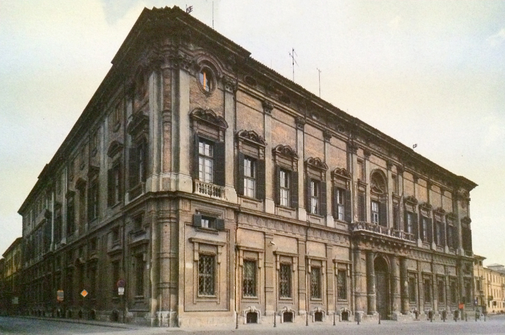 Vista di Palazzo Ghilini, lato nord